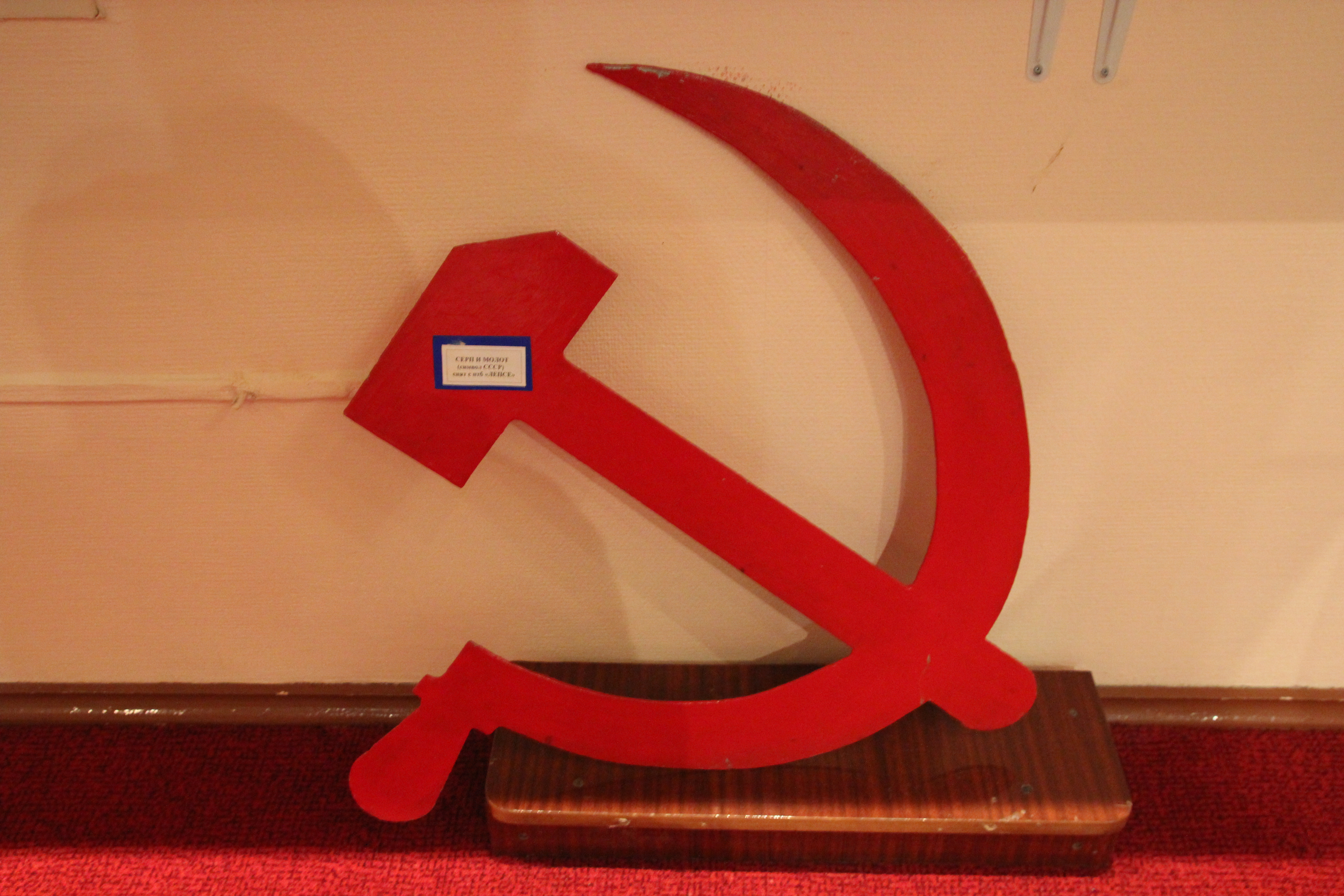 Смерп и молот с судна Лепсе